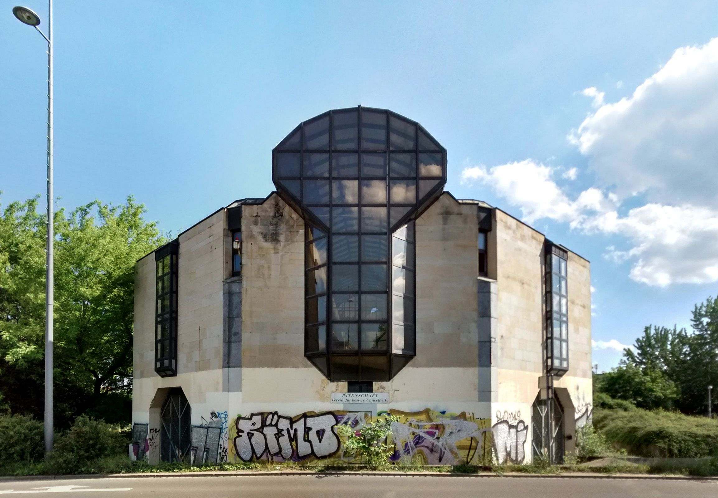 Bowlingtreff am Wilhelm-Leuschner-Platz, Leipzig, 1987, Winfried Sziegoleit, Aufnahme Juni 2016